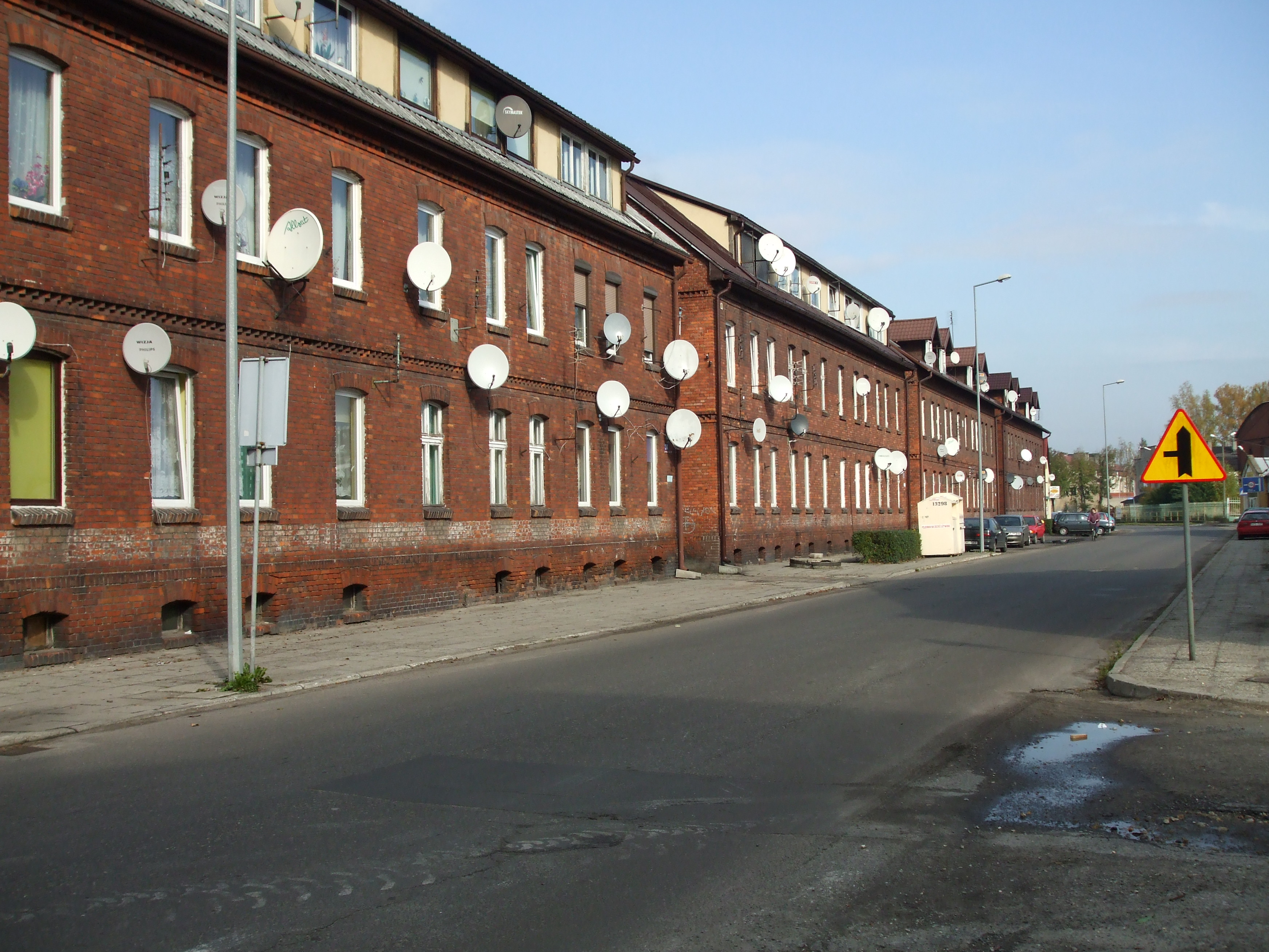 Murów (opolskie)